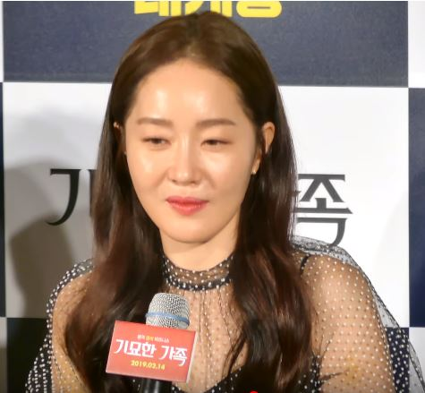 15일 오전 서울시 중구 을지로 메가박스 동대문에서 영화 '기묘한 가족' 제작보고회가 열려 이민재 감독, 정재영, 김남길, 엄지원, 이수경, 정가람, 박인환 배우가 참석해 배역 캐릭터에 대해 키워드로 설명하고 있다.